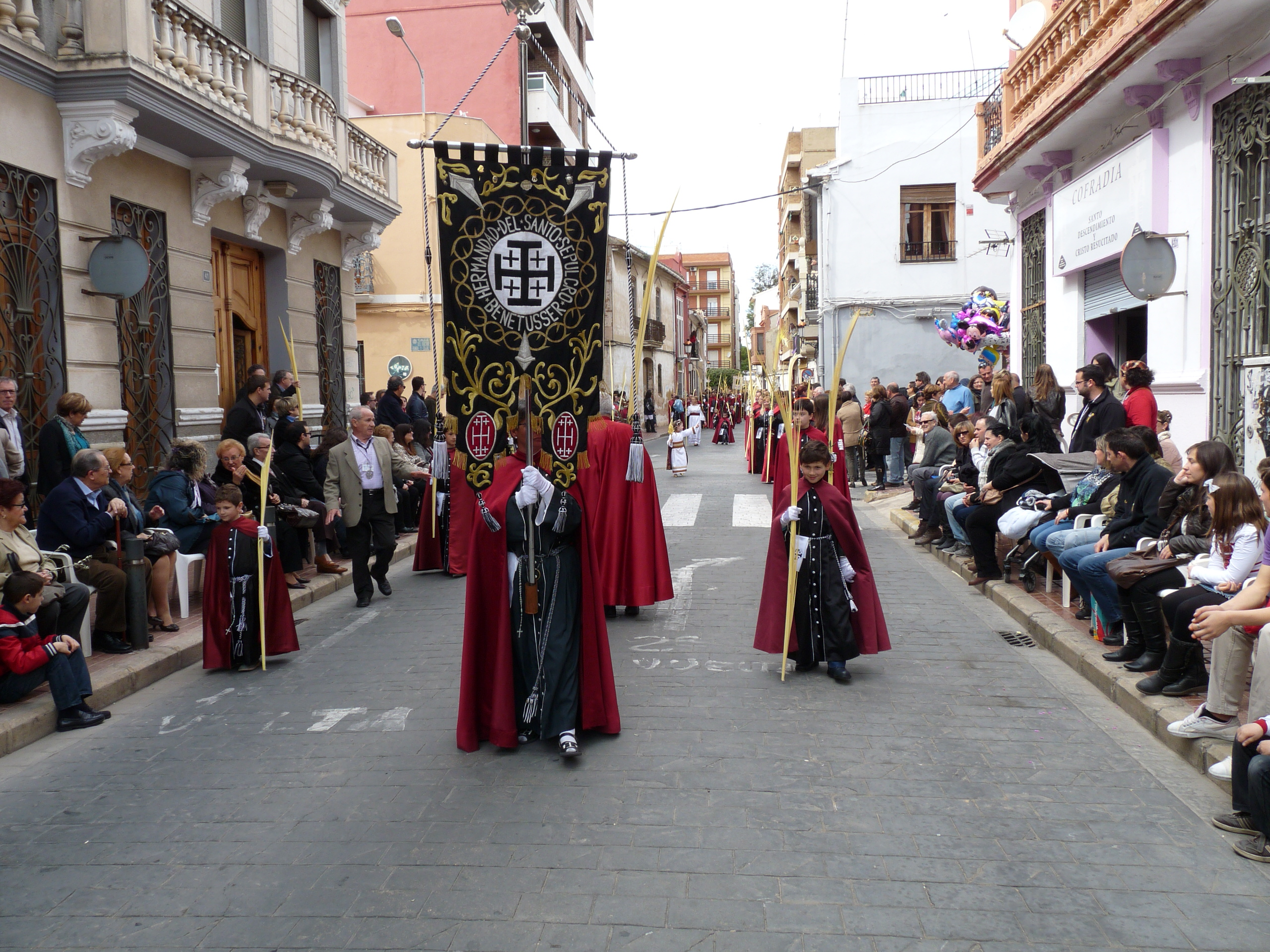 Estandarte del Santo sepulcro benetusser